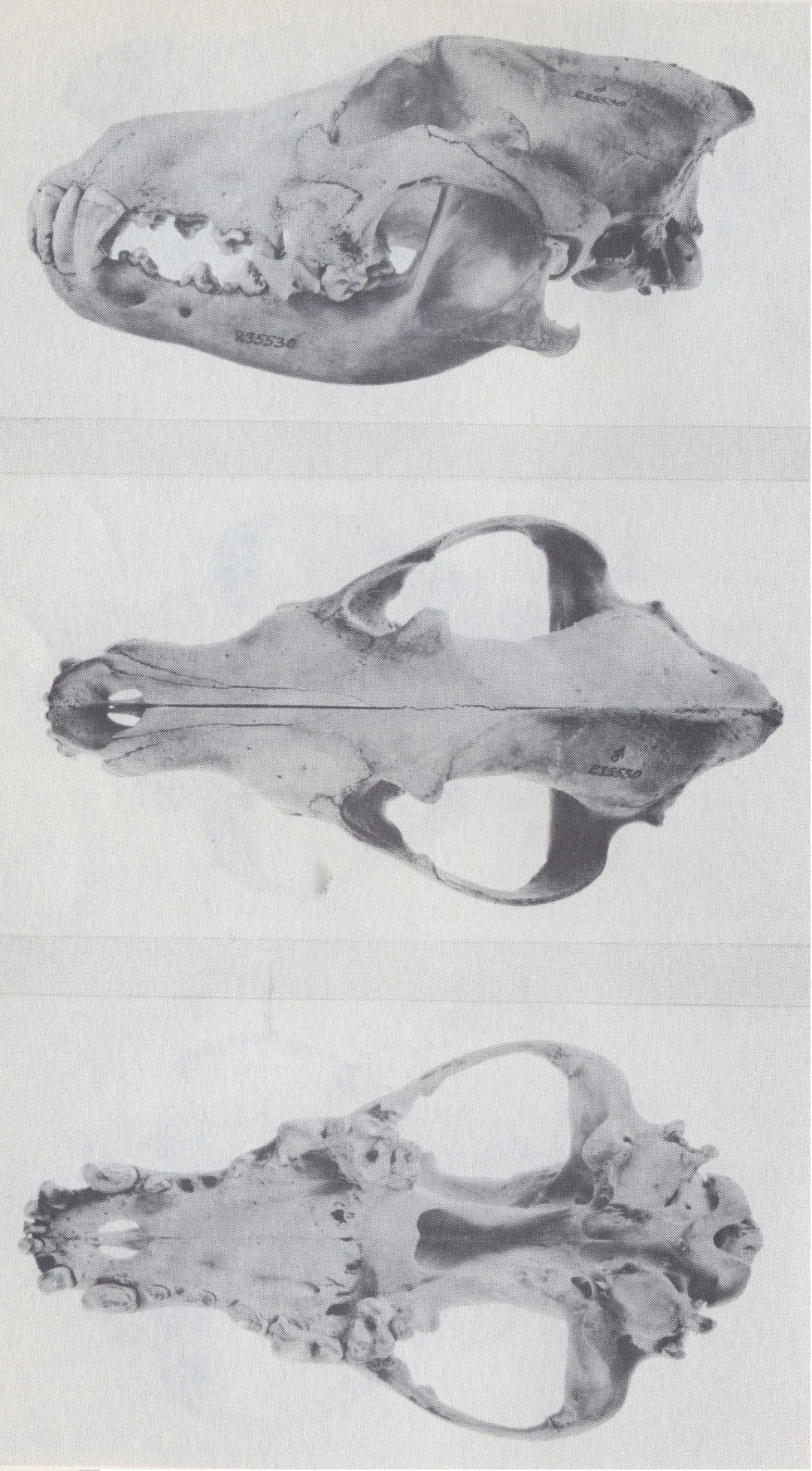 Gray wolf skull.